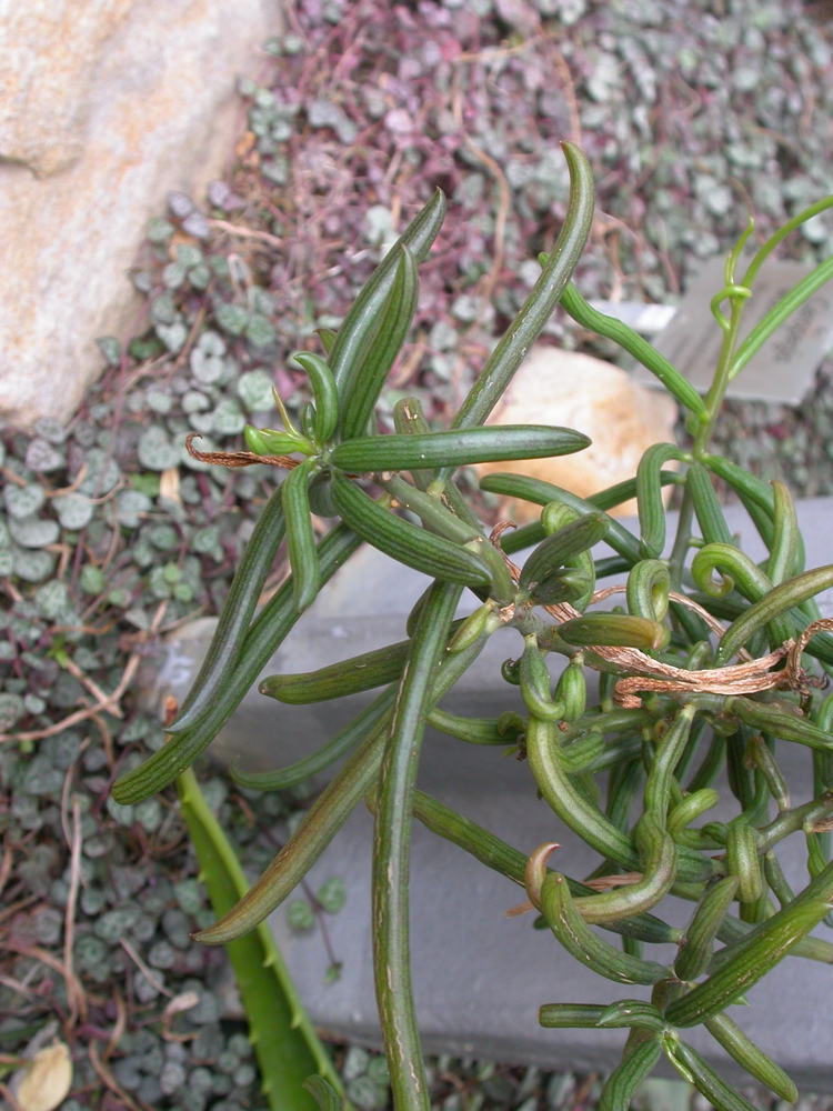 Senecio antandroi